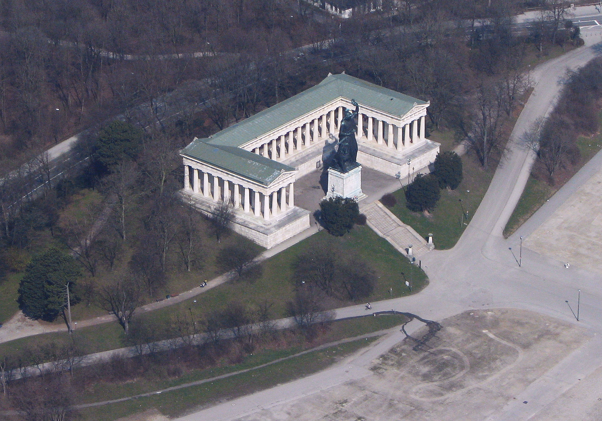 Luftbild Bavaria 18.5 m, erbaut bis 1850 auftrags König Ludwig I. - Ruhmeshalle erbaut bis 1853 (L 68 x T 32m), auf der Theresienwiese München Bayern Germany - Foto Wolfgang Pehlemann HSBD0280